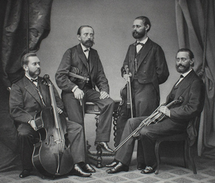 Gruppenbild des Streichquartetts Gebrüder Müller [d. Jüngeren]. (Wilhelm, Karl, Hugo und Bernhard Müller)